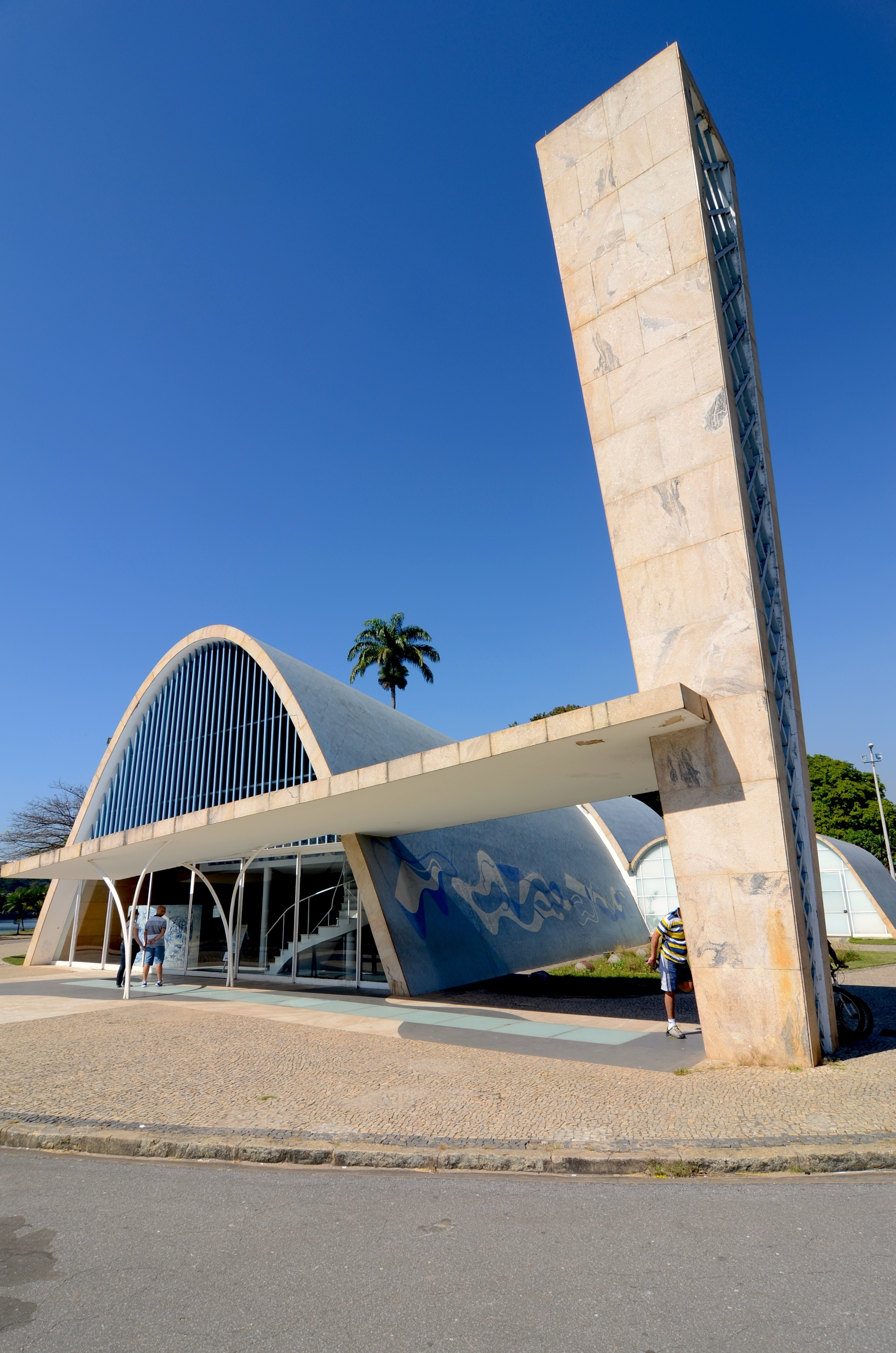 Igreja de São Francisco de Assis